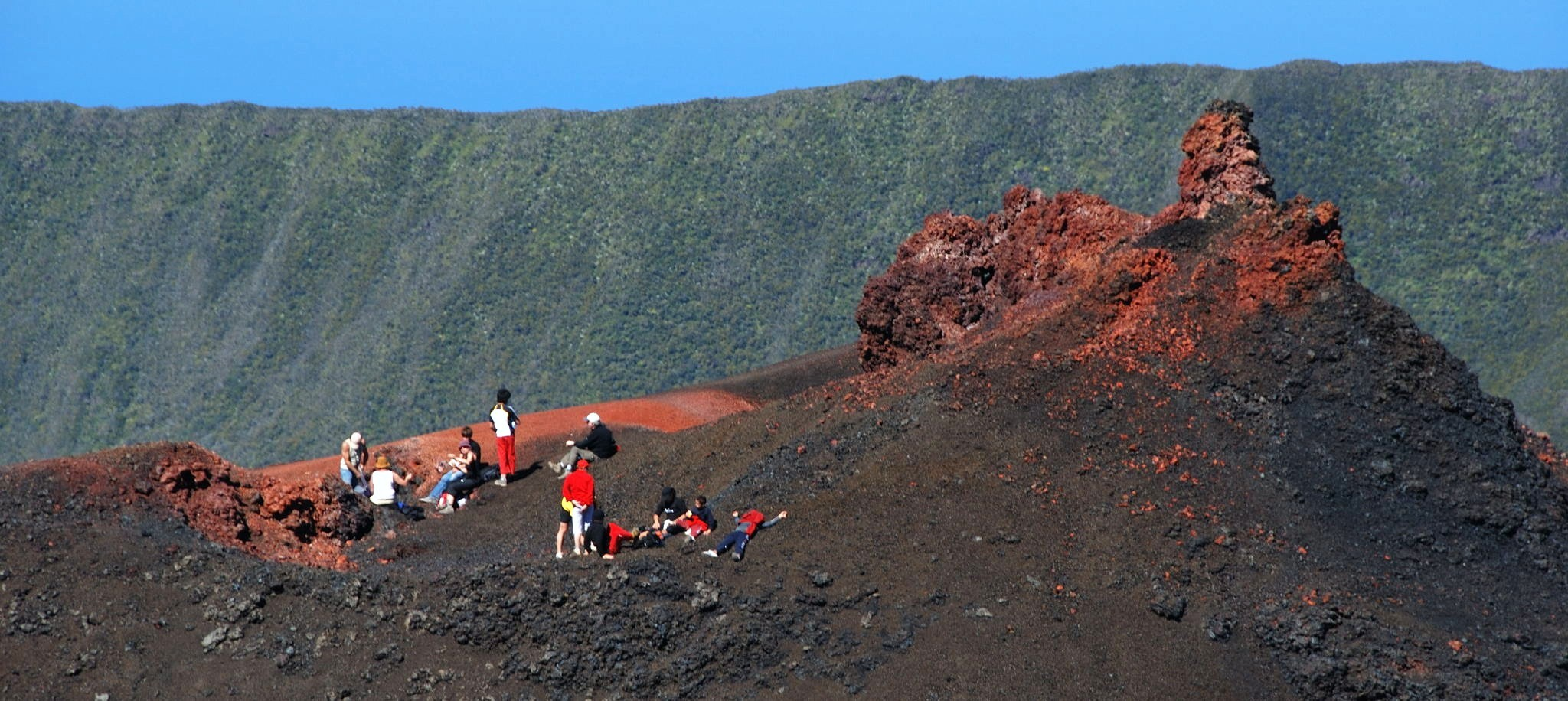 promenade dans l'Enclos